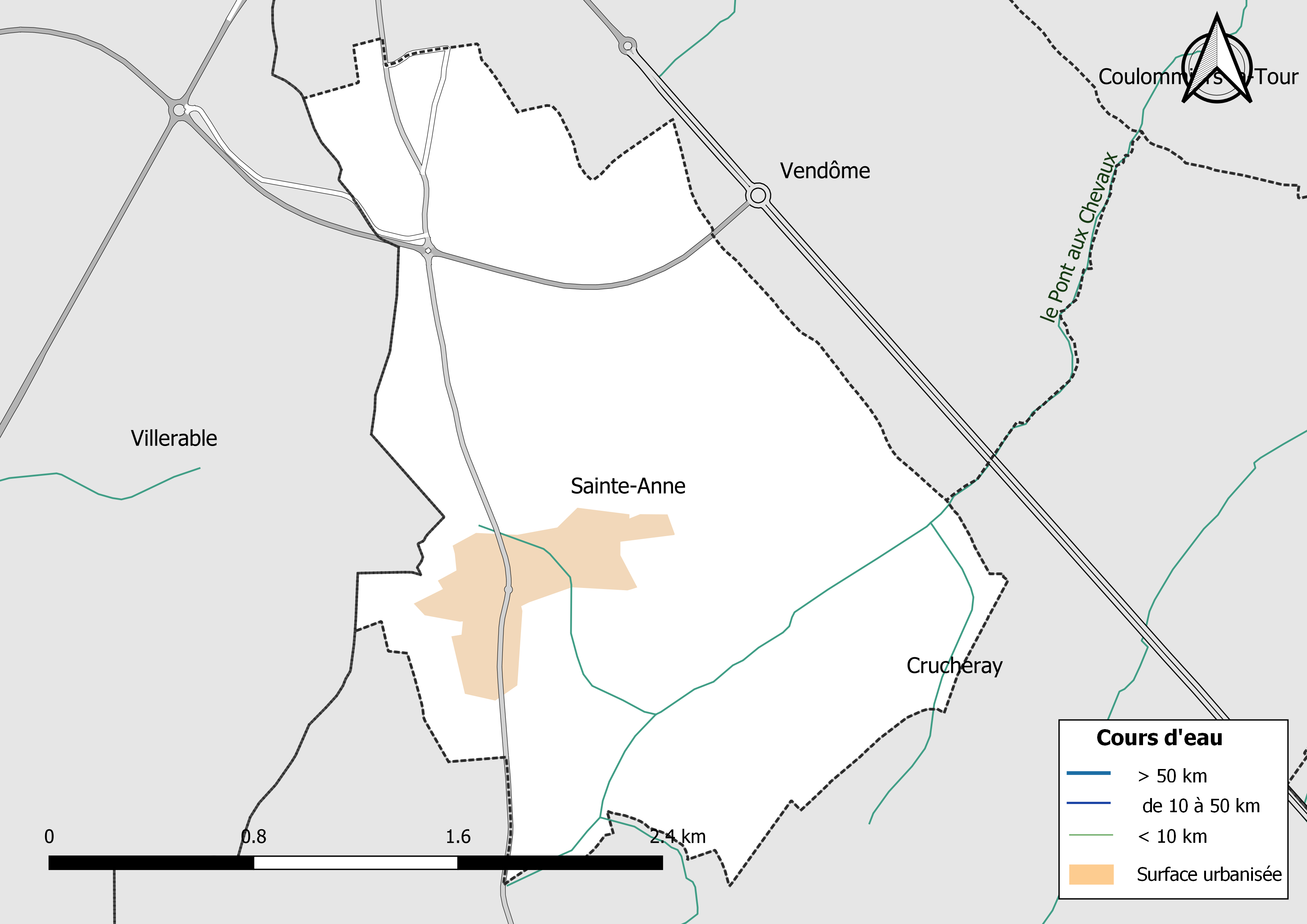 Carte du réseau hydrographique de la commune de Sainte-Anne (Loir-et-Cher) (France).